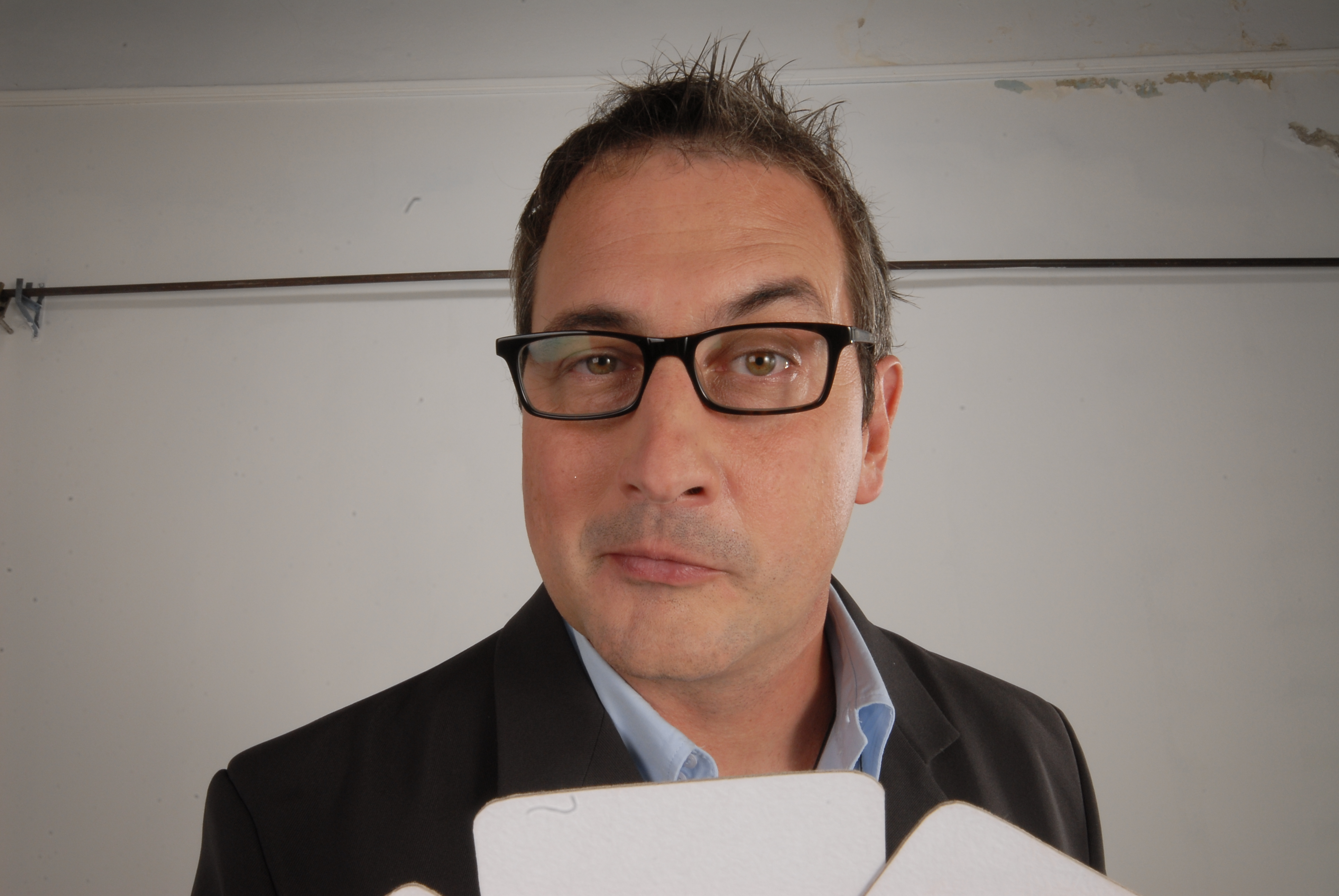 Luis Rubio